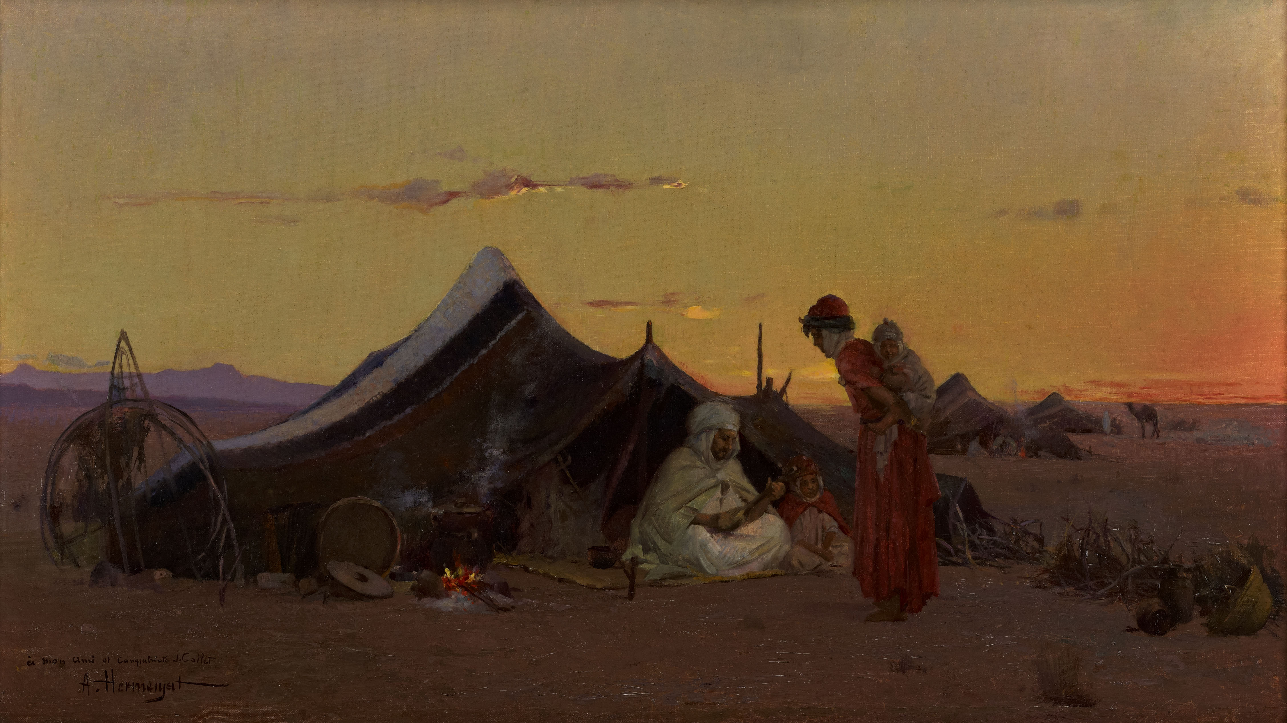 Abraham Hermanjat, Campement de bédouins au crépuscule, sans date [vers 1892-1893], huile sur toile, 53,5 x 92 cm. Nyon, Fondation Abraham Hermanjat.